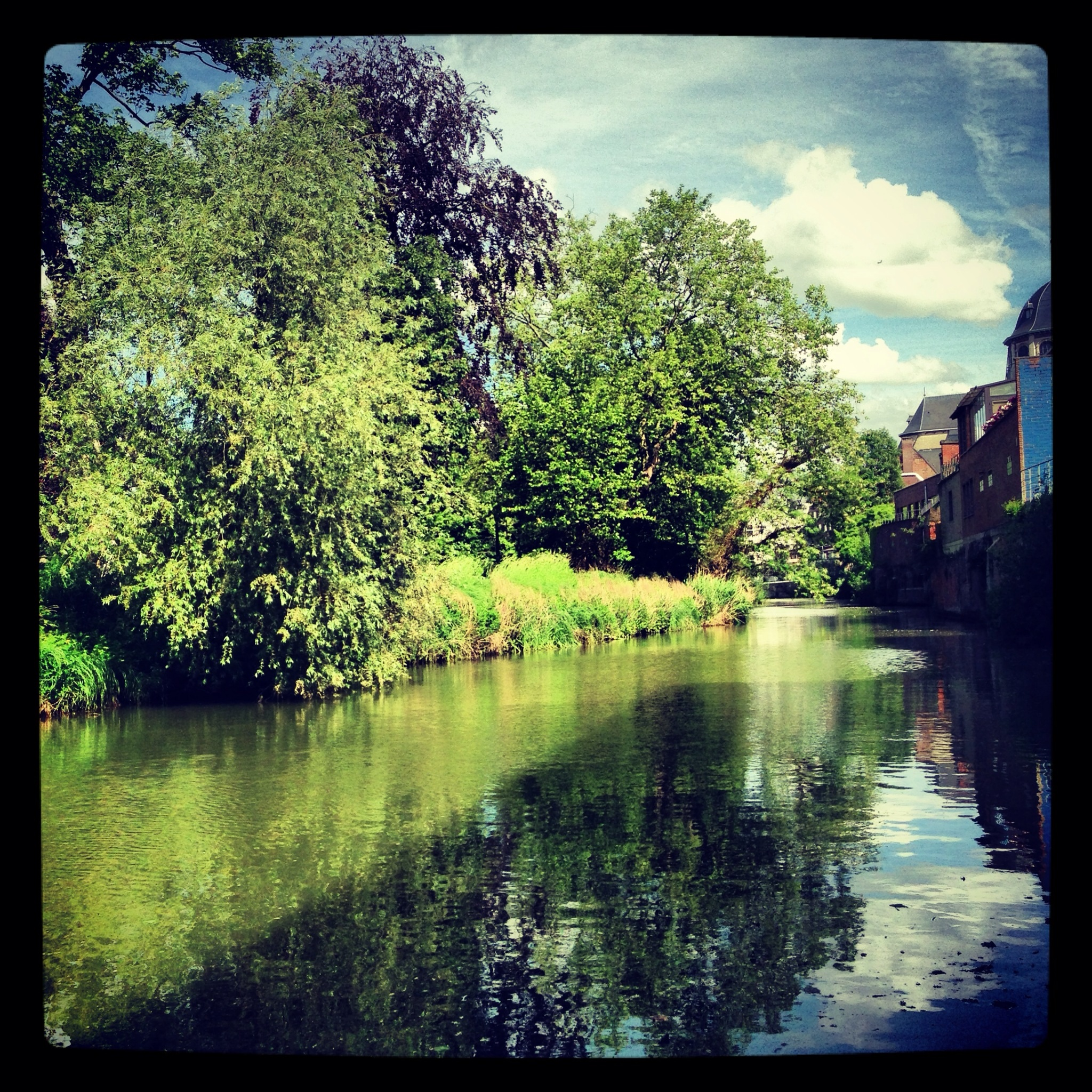 Dijle